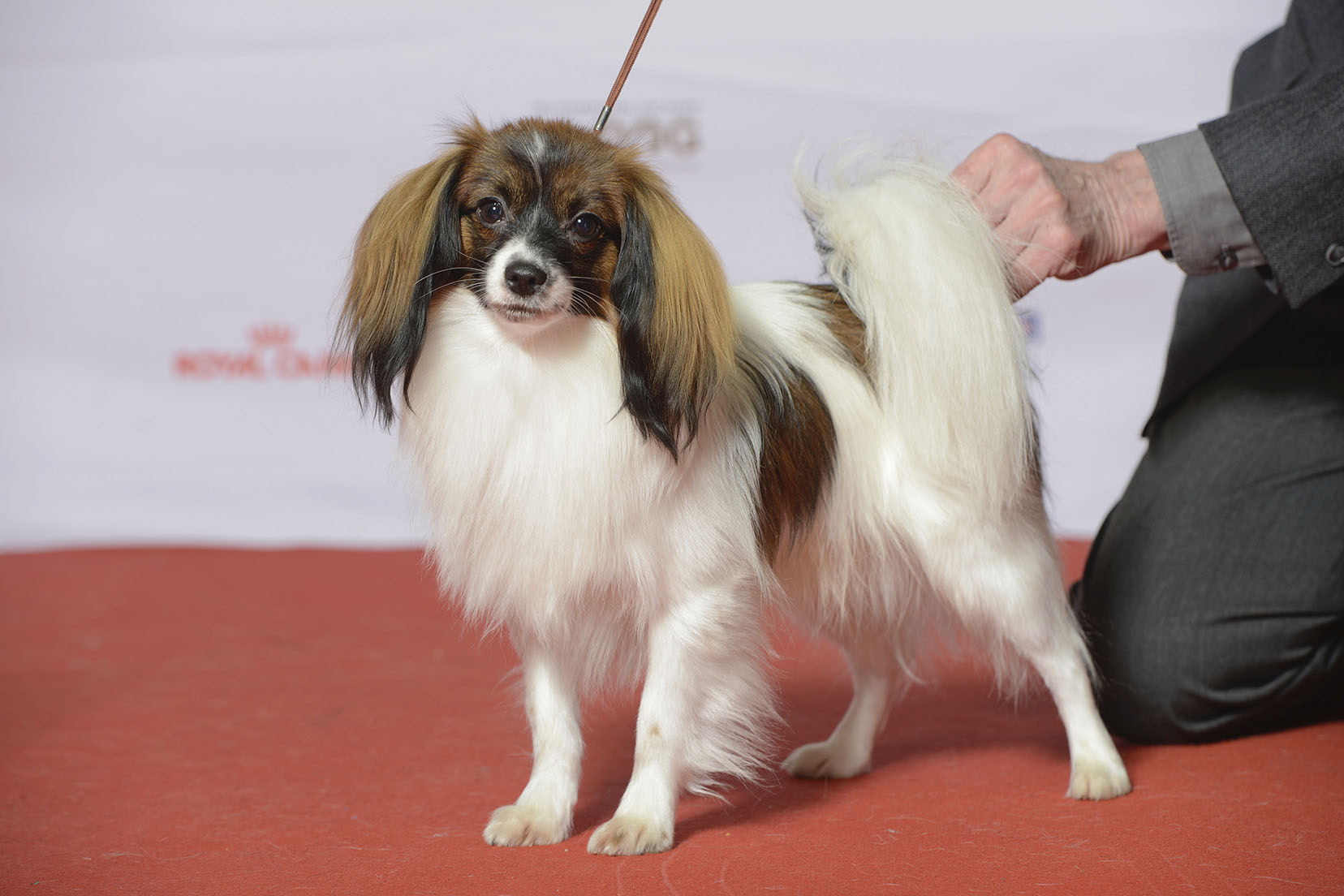 PHALENE, Vittoria’s Come Along MyDOG, Nordens största hundevenemang